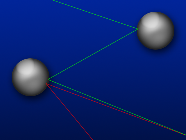 Un exemple exposé par Poincaré pour illustrer la notion de chaos : si on envoie un faisceau lumineux sur une sphère réfléchissante, la différence d'angle si on déplace d'un dixième de degré la source, le rayon réfléchi peut changer totalement de direction. Si on place une seconde sphère, l'effet est encore plus marqué.